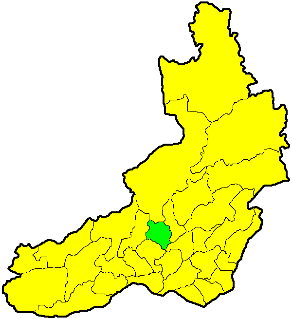 Шилкинский район на карте Забайкальского края